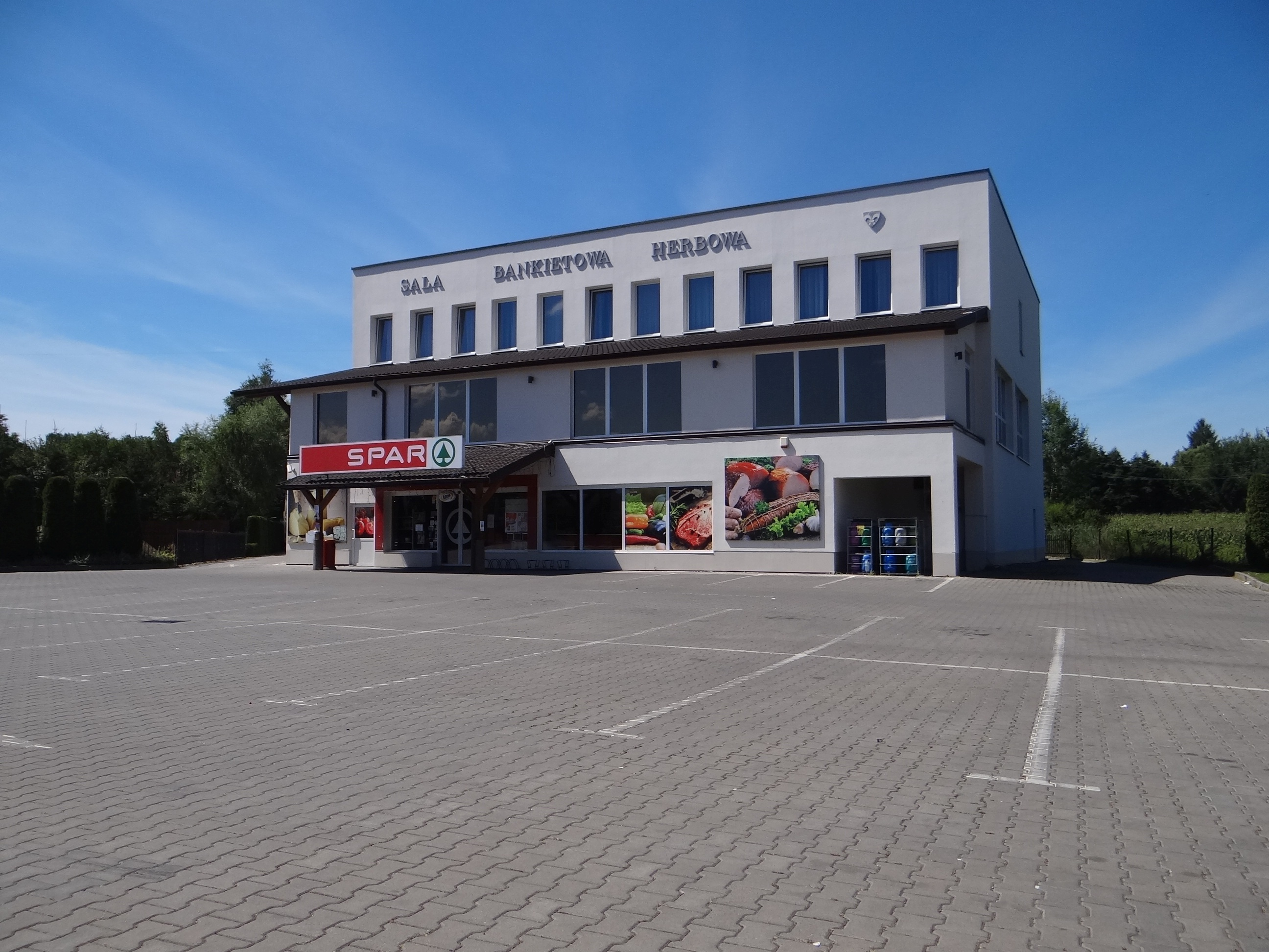 Łapanów. Sala bankietowa